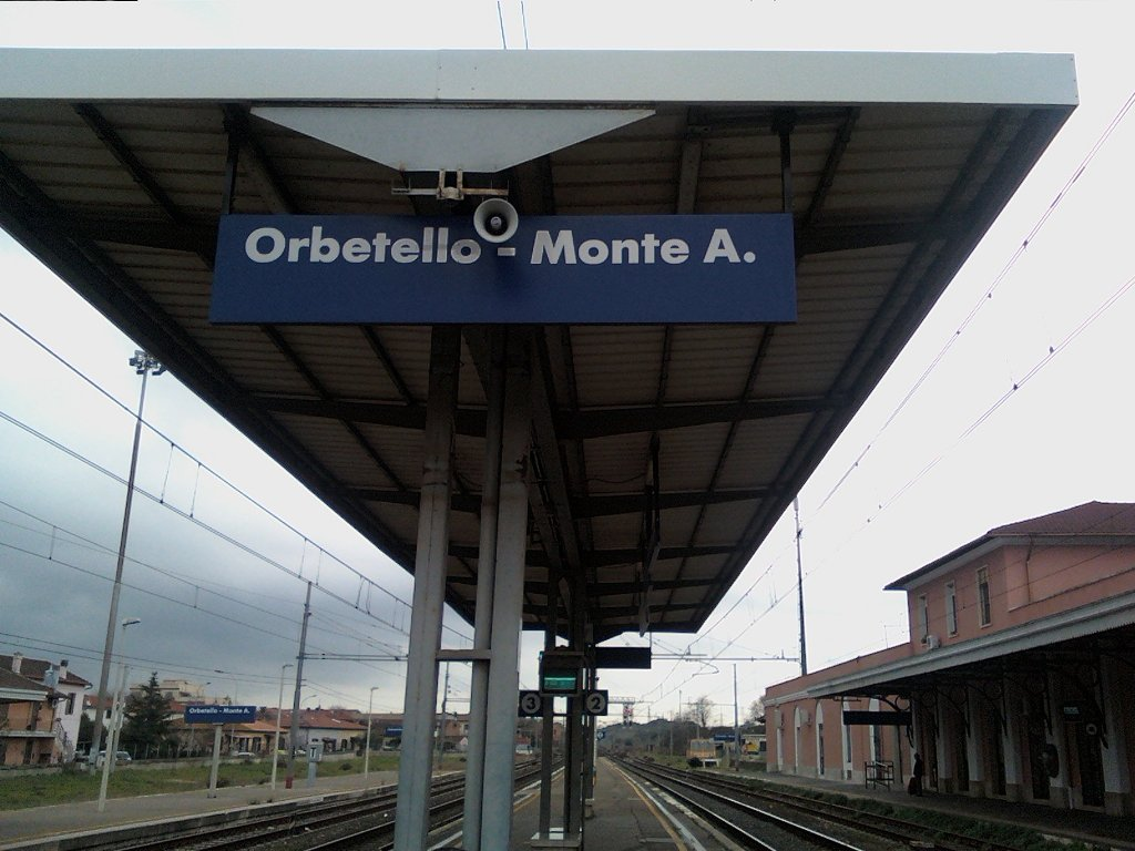 Altra veduta della stazione FS